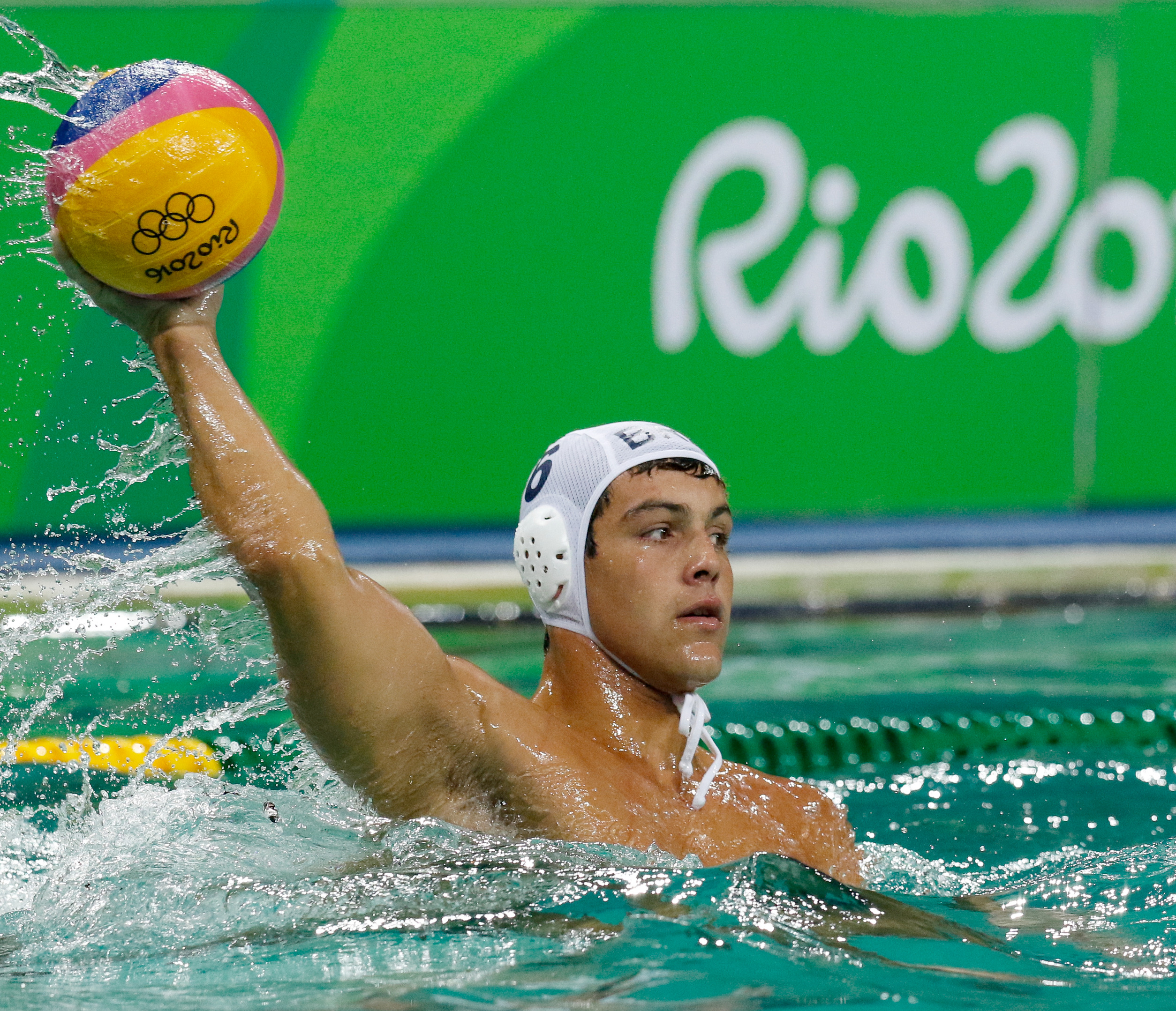 Seleção masculina brasileira de polo aquático vence a da Sérvia por 6 a 5 nos Jogos Olímpicos Rio 2016 no Parque Aquático Maria Lenk (Fernando Frazão/Agência Brasil)